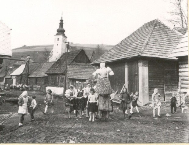 Вынос Мармурены. Словакия